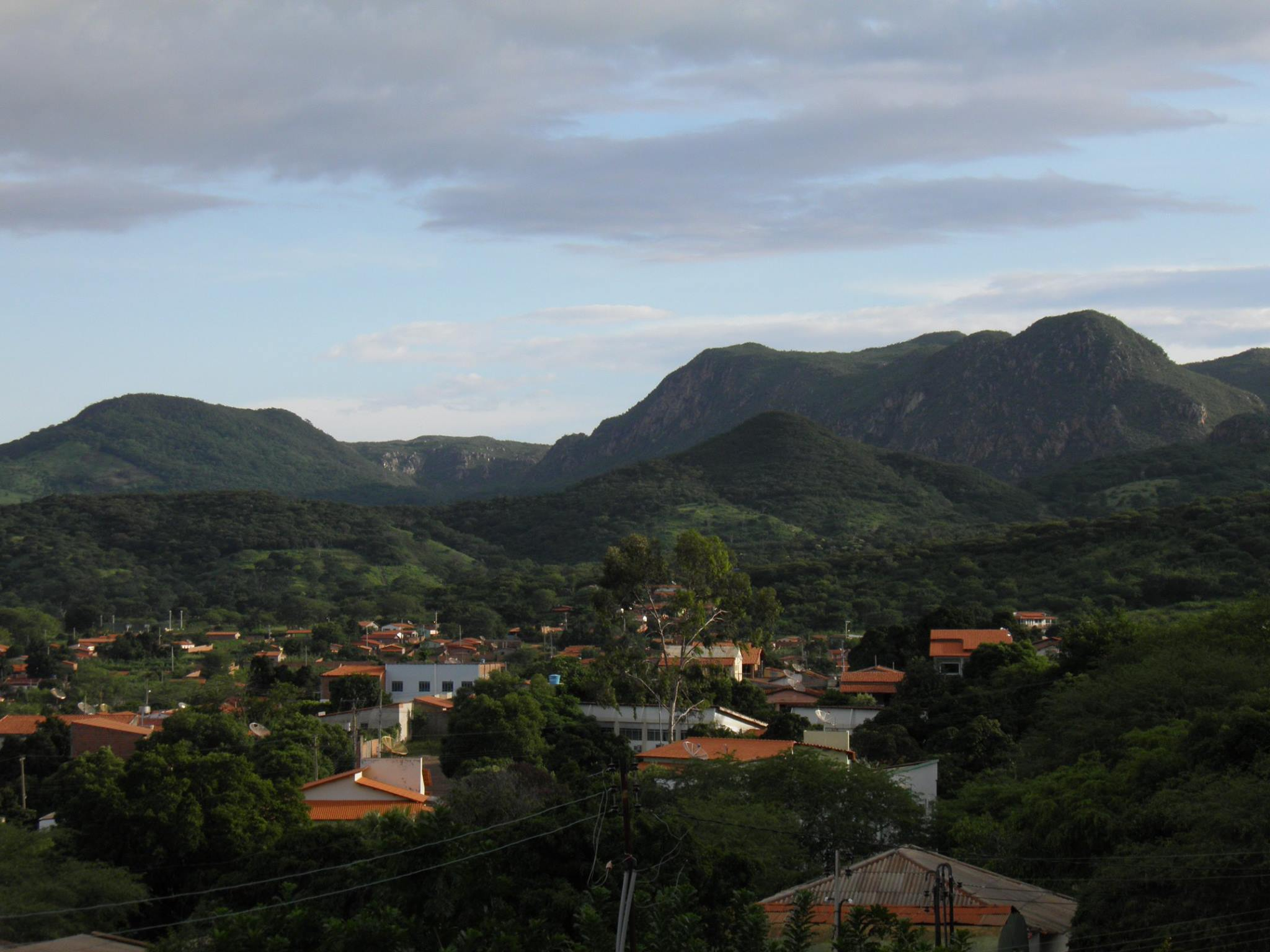 paisagem